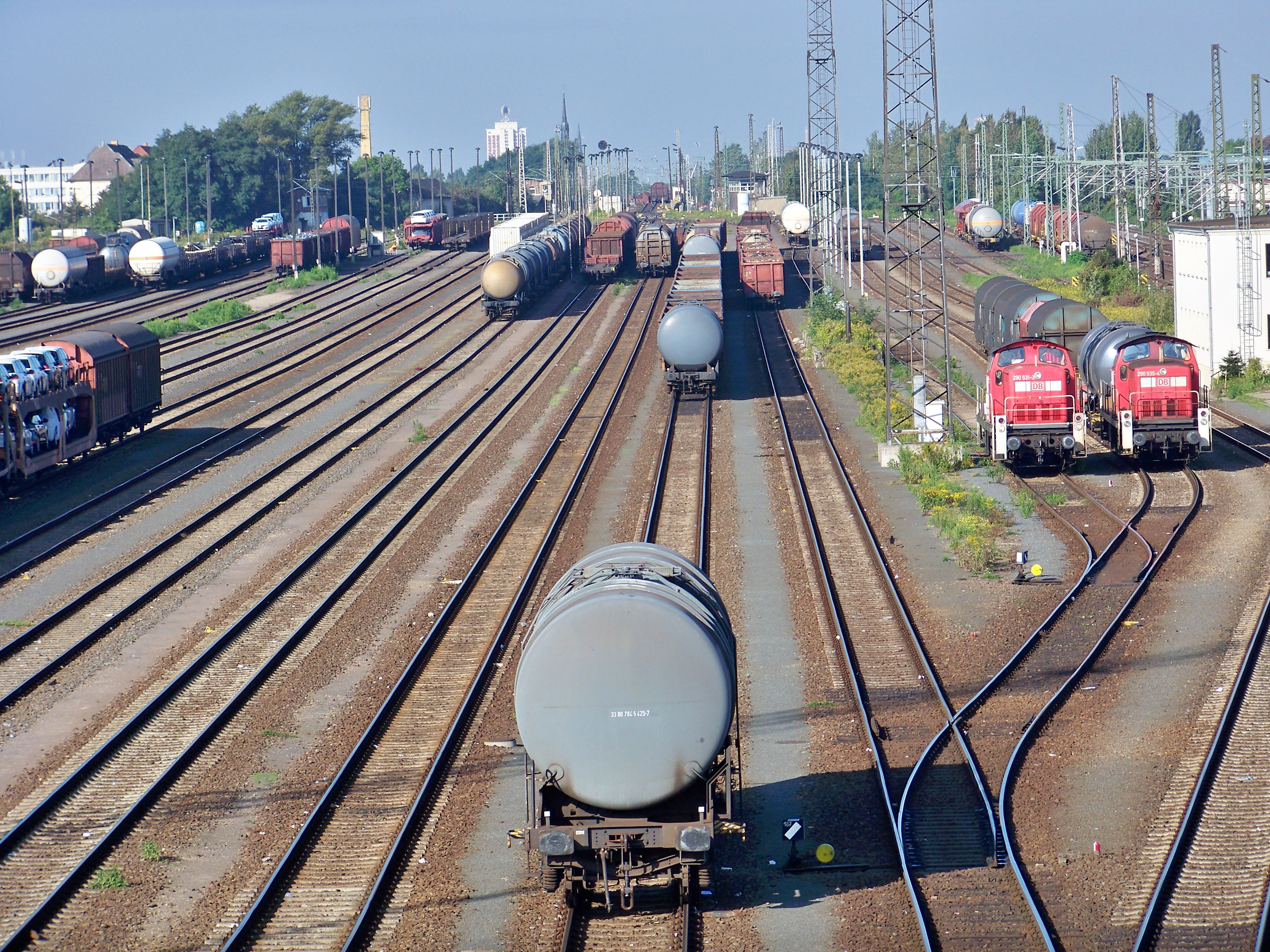 Güterbahnhof Engelsdorf in Leipzig, Richtungsgleise vom Brückensteg Richtung Westberg